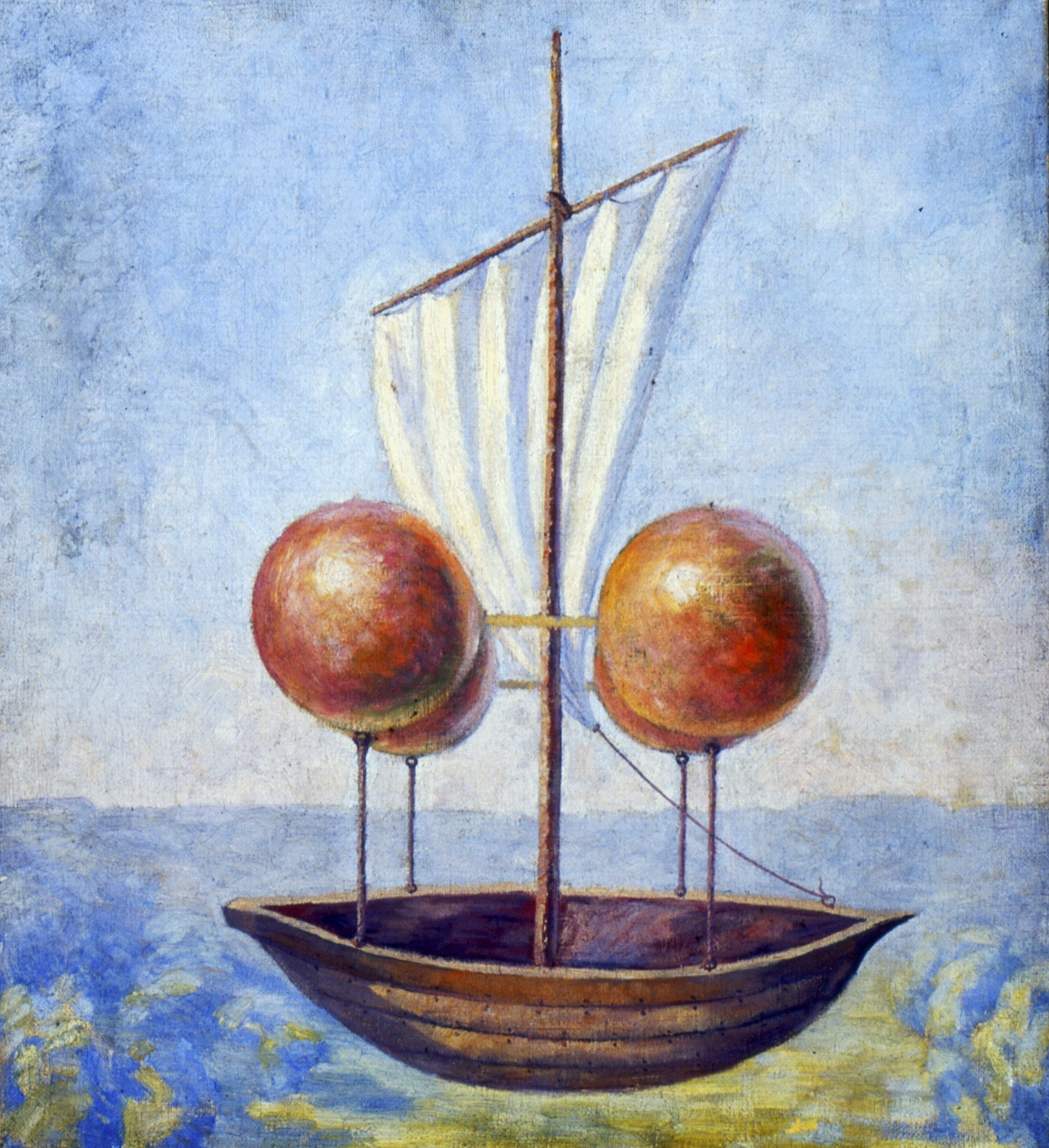 Obra que integra o acervo do Museu Paulista da USP. Coleção José Wasth Rodrigues - CJWR